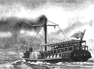 Первый русский пароход, построенный на заводе Чарльза Берда в Санкт-Петербурге